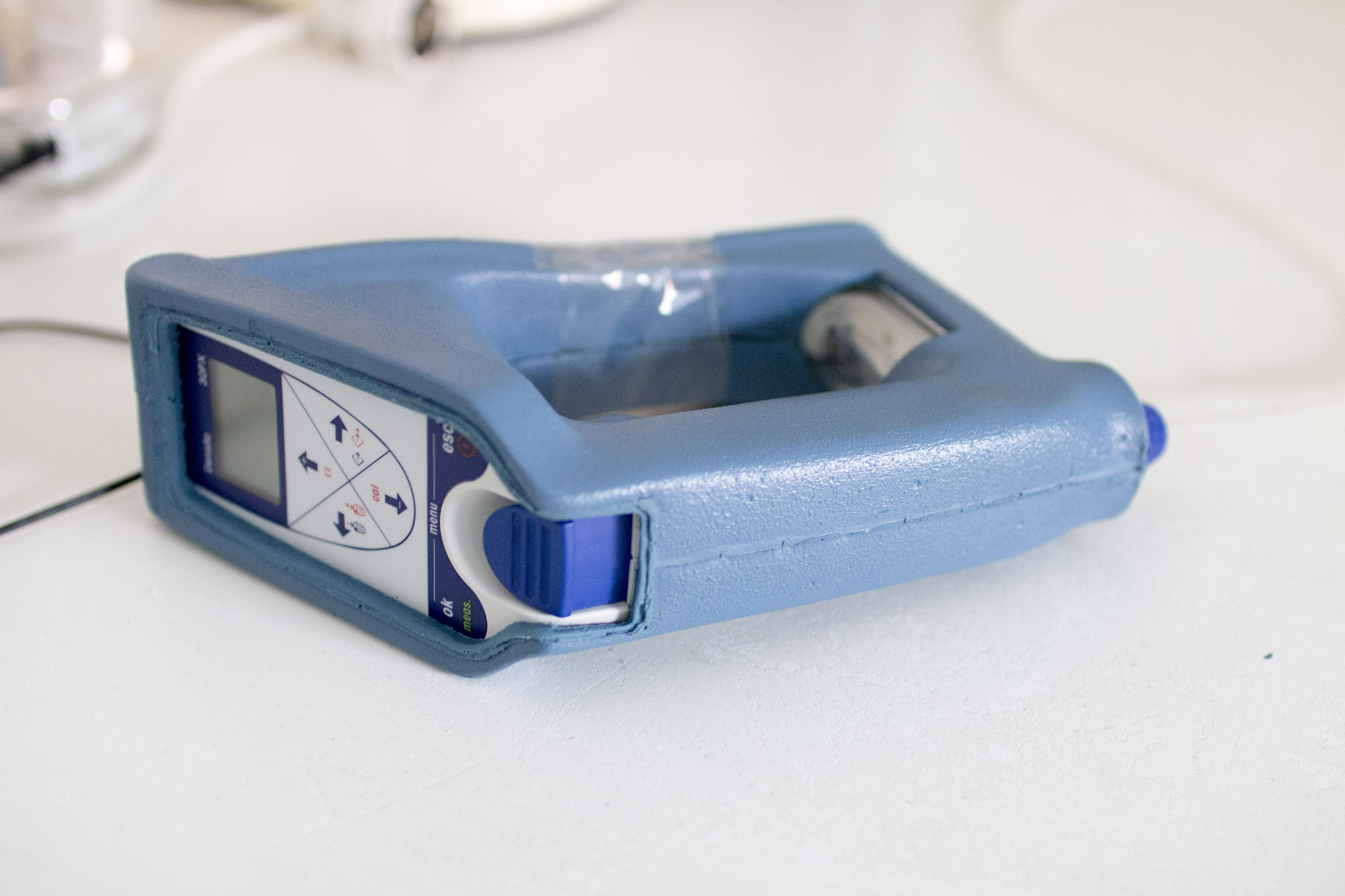 Densimètre éléctronique